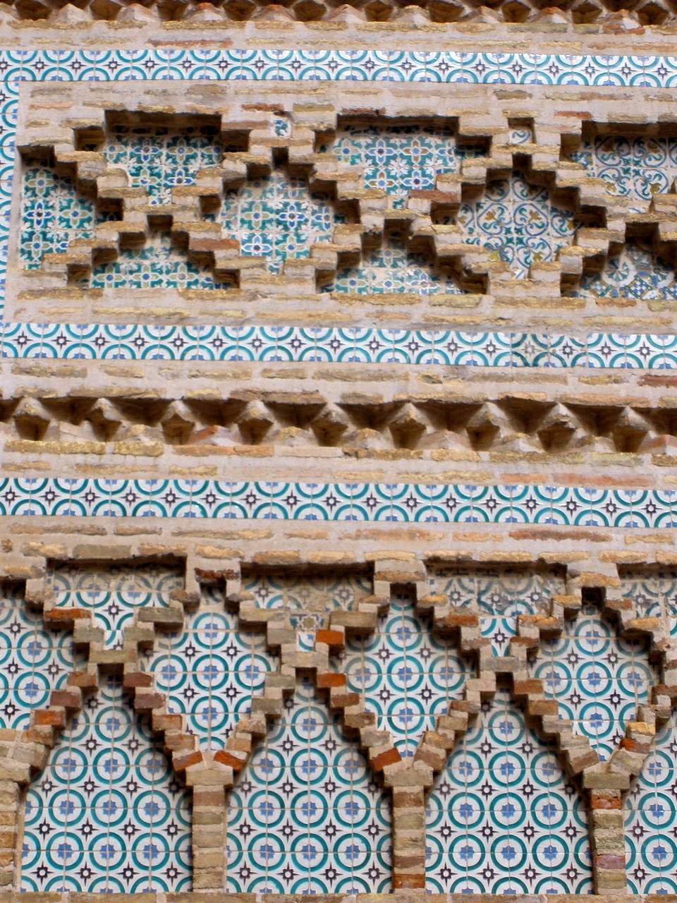 Utebo - Iglesia de Nuestra Señora de la Asunción (provincia de Zaragoza). Paños de sebka